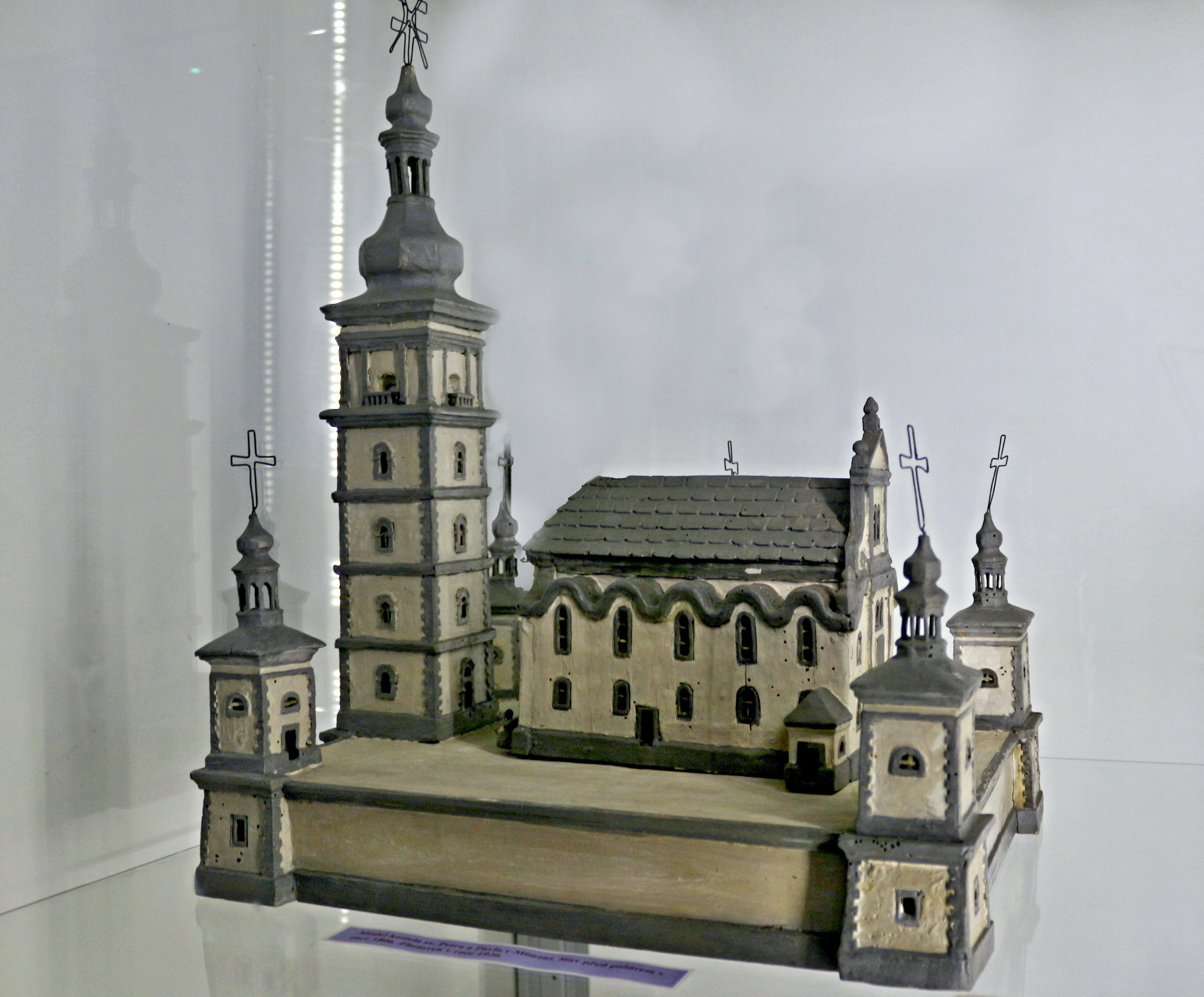 Expozice Městského muzea Mimoň